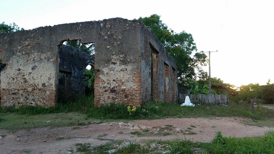 Vista diurna del Fortin